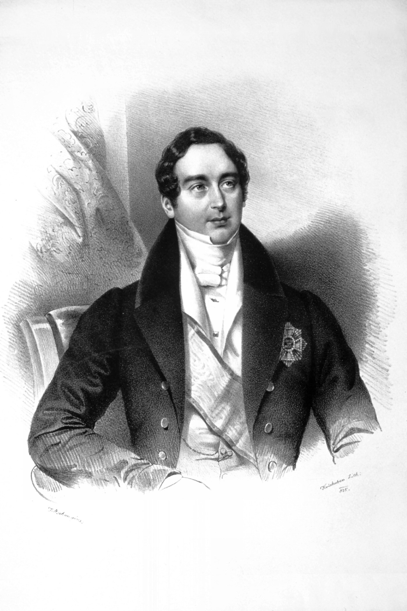 Mathias Constantin Capello von Wickenburg (1794-1880), Reichsgraf, Gouverneur der Steiermark, k. k. Handelsminister, Förderer von Gleichenberg. Lithographie von Josef Kriehuber nach einem Gemälde von Josef Eduard Teltscher, 1835